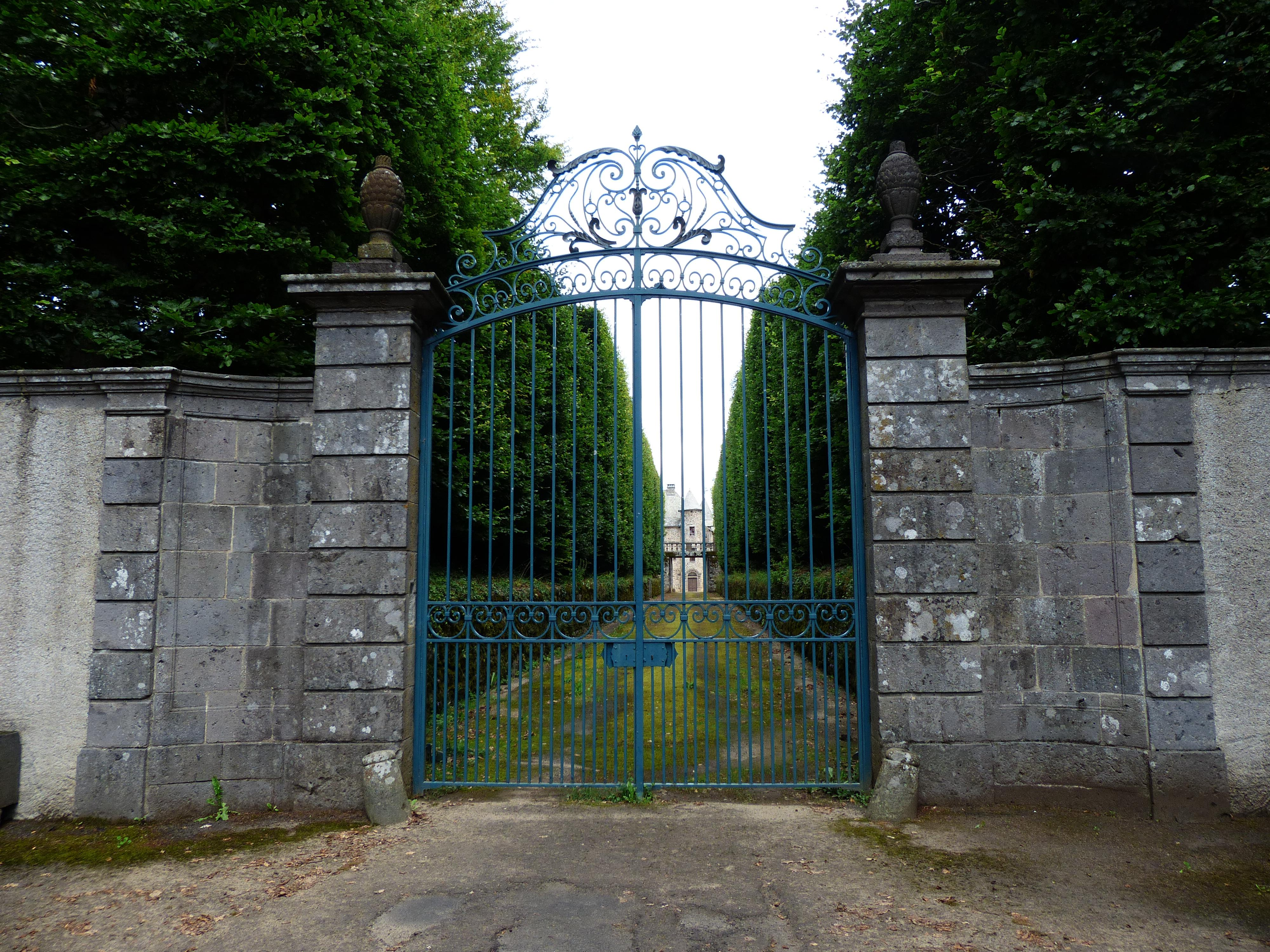 Château de Cordès à Orcival (Puy-de-Dôme, France). Grille d'entrée dans le parc.